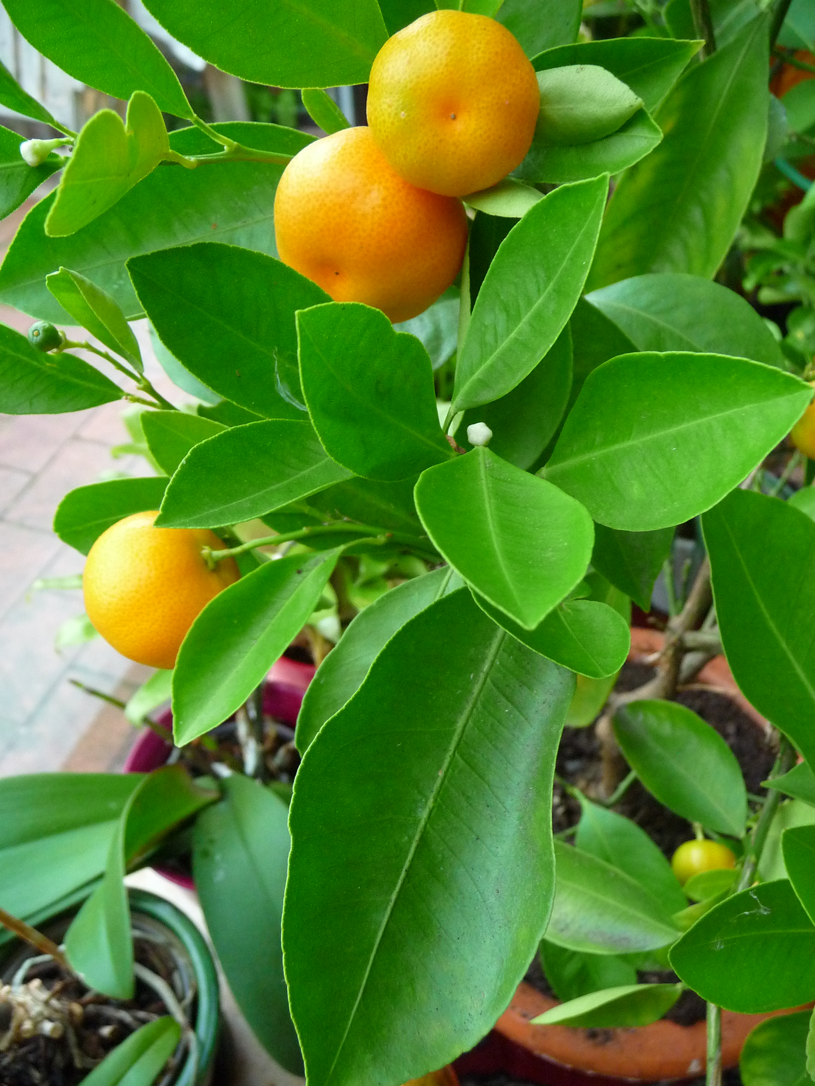 Mandarinenbäumchen (Citrus reticulata), fotografiert im Rhein-Neckar-Kreis (Baden-Württemberg, Deutschland)